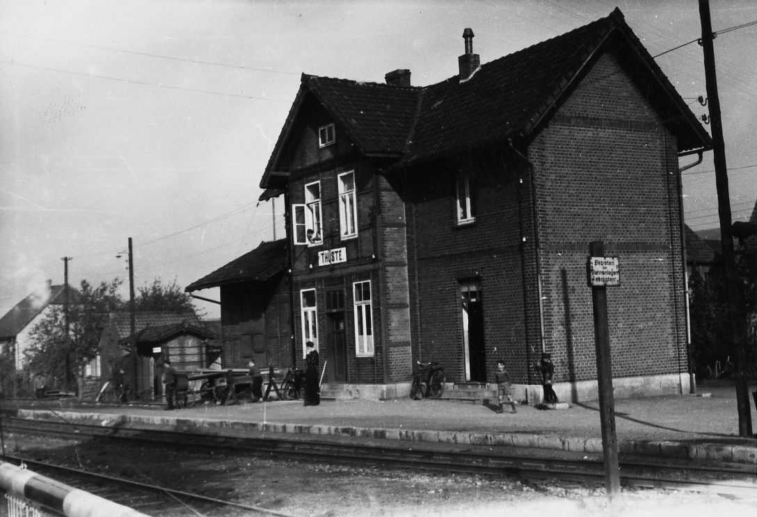 Foto vom Bahnhof Thüste, Kleinbahn Voldagsen-Duingen-Delligsen